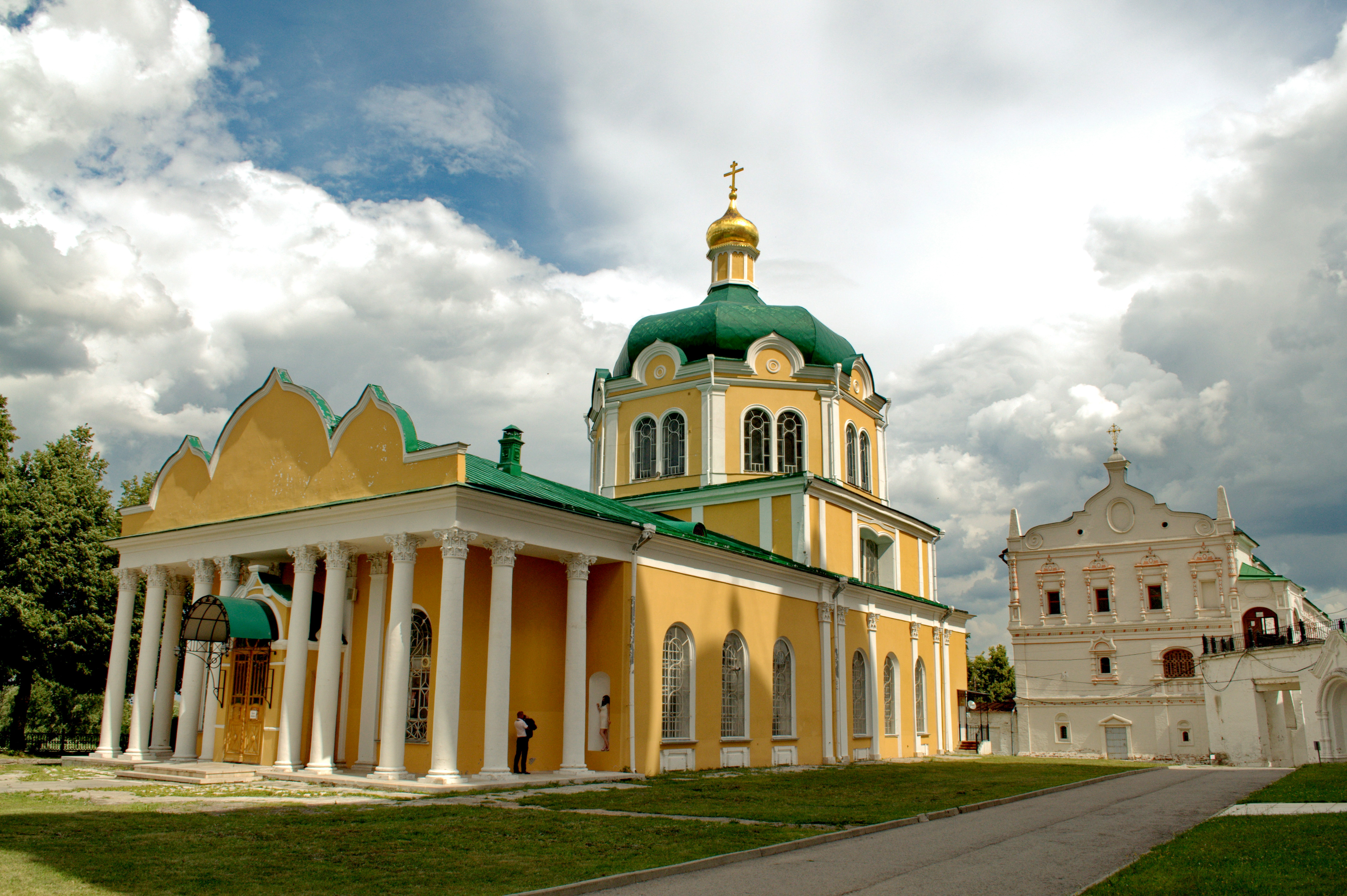 Ансамбль Кремля (Рязанский историко-архитектурный музей-заповедник) (Рязанская область, Рязань, Кремль)